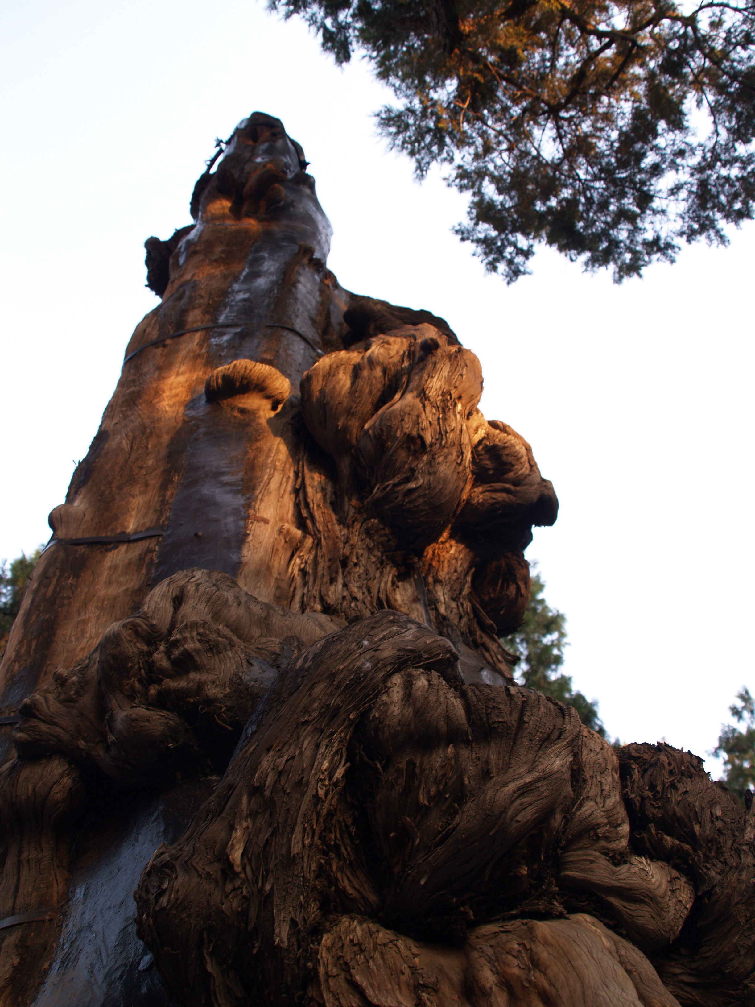 Forbidden City Beijing